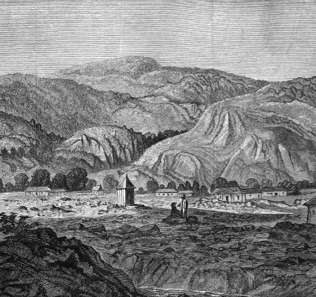 Vederea Petroasei - din Studiul Tesaurul de la Petrosa (1889) a lui Alexandru Odobescu